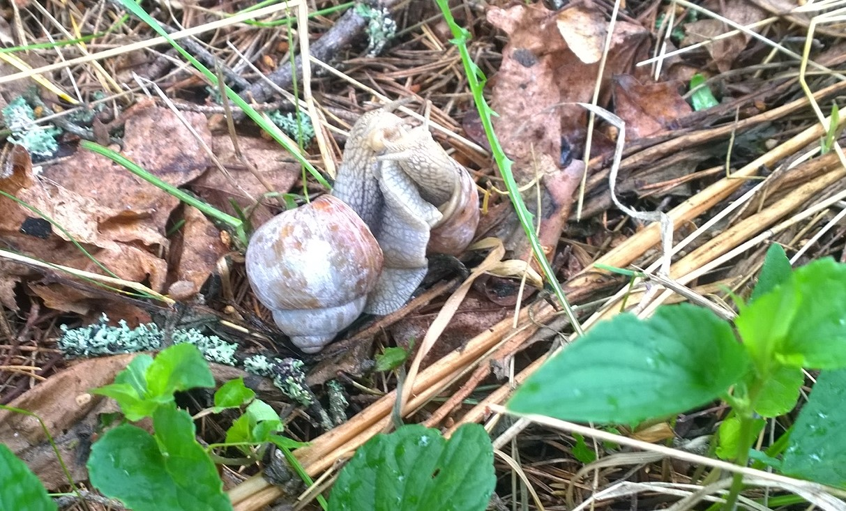 Parittelu käynnissä. Anjala, kesäkuun puoliväli